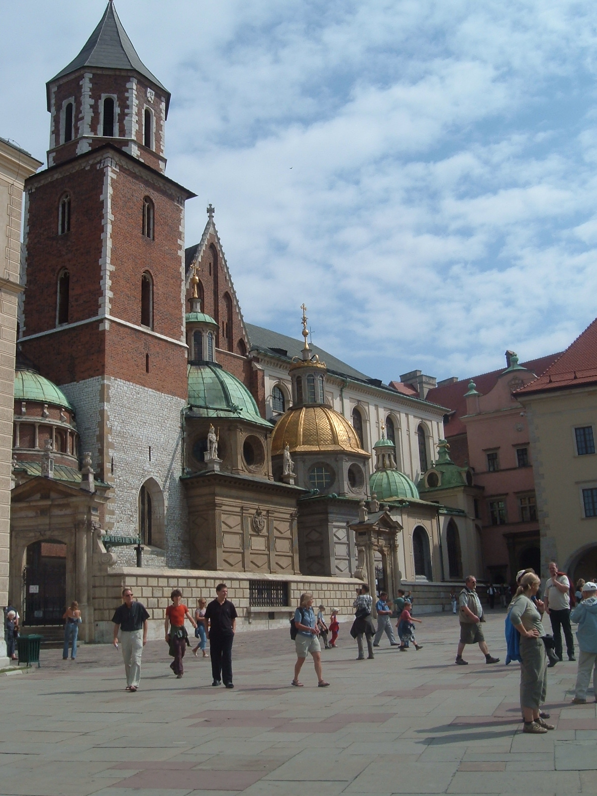 Kraków, Poland